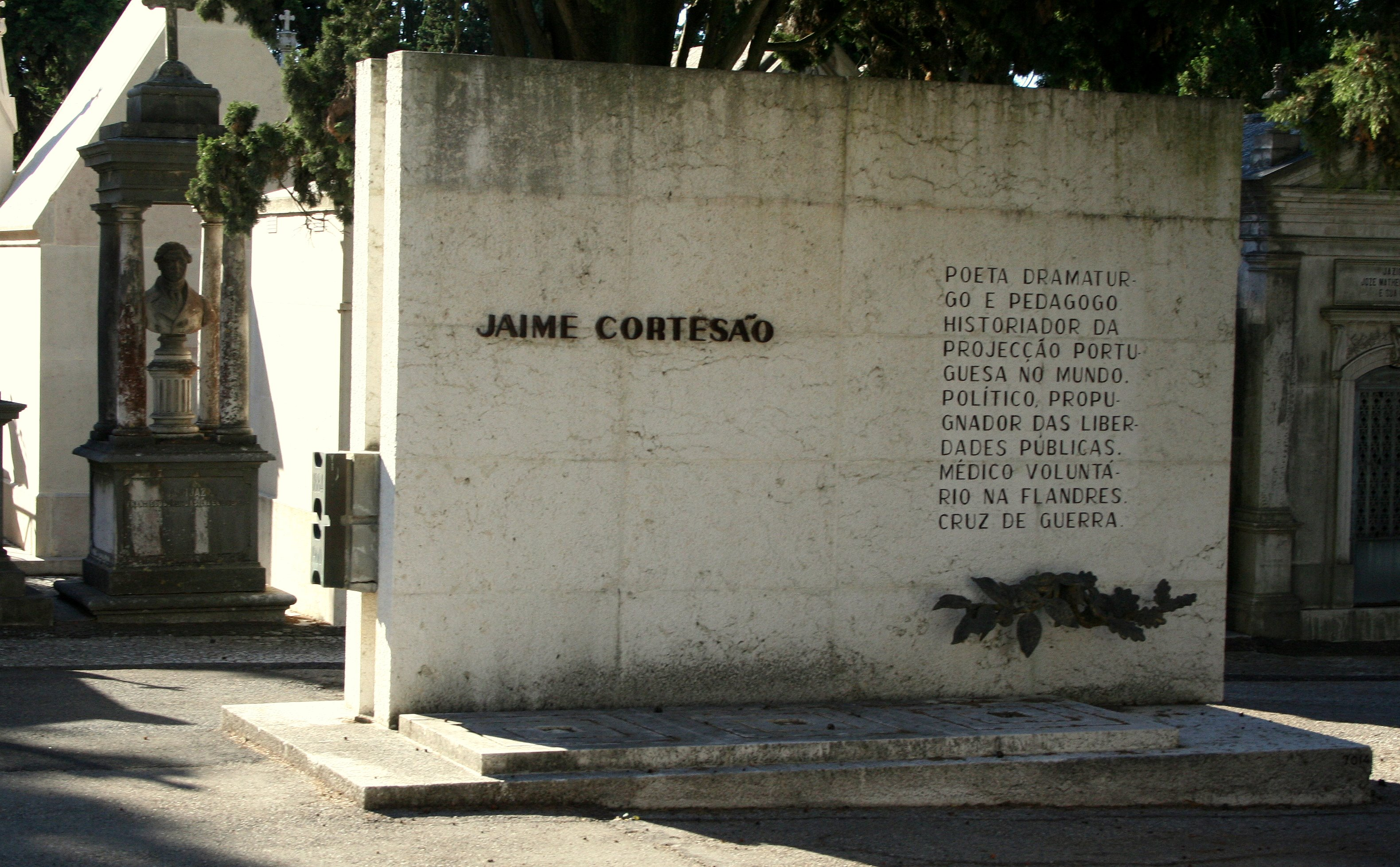 Jaime Cortesao Tomb, Prazeres Cemitery, Lisbon, Portugal